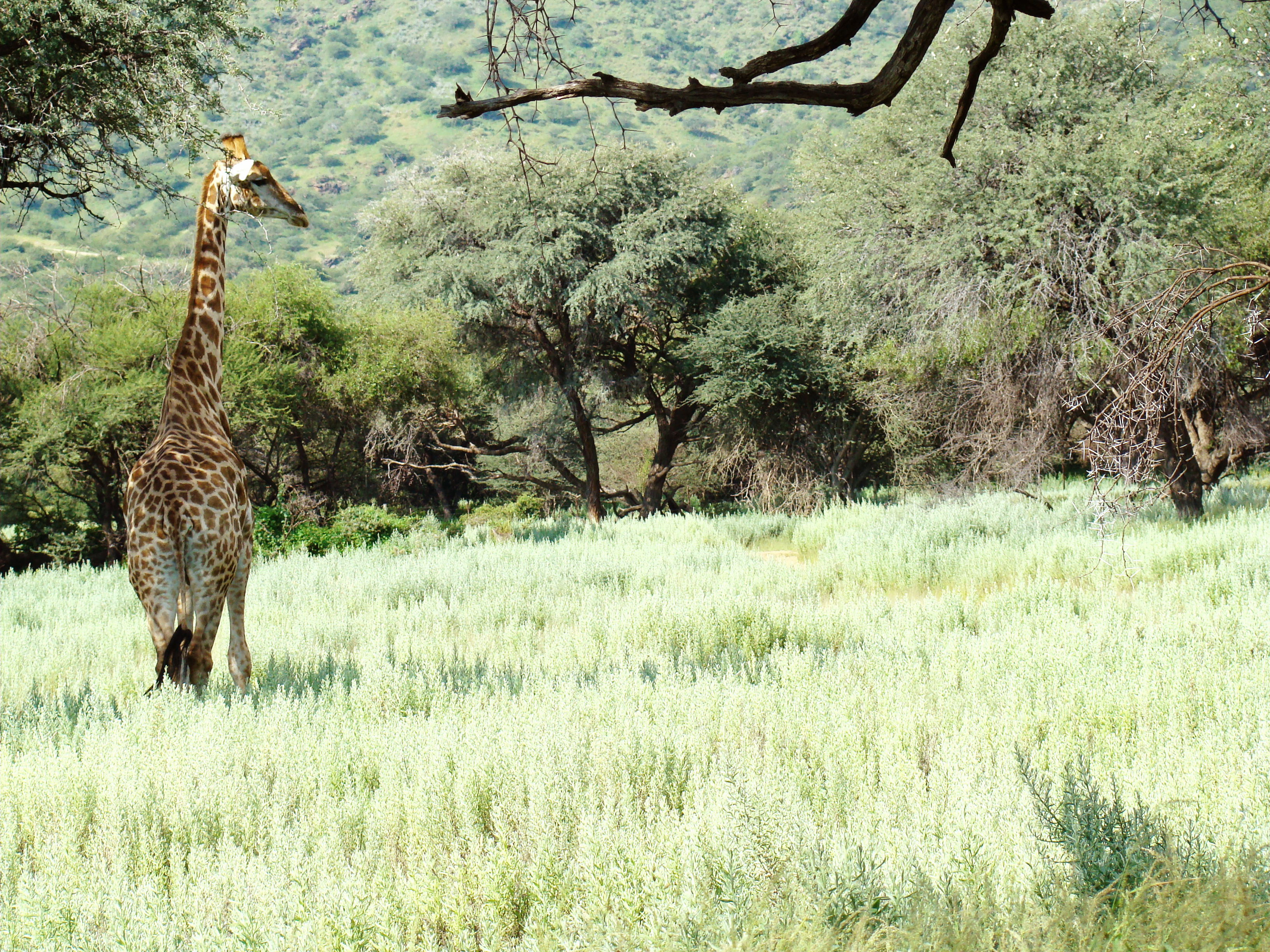 Жираф на воле